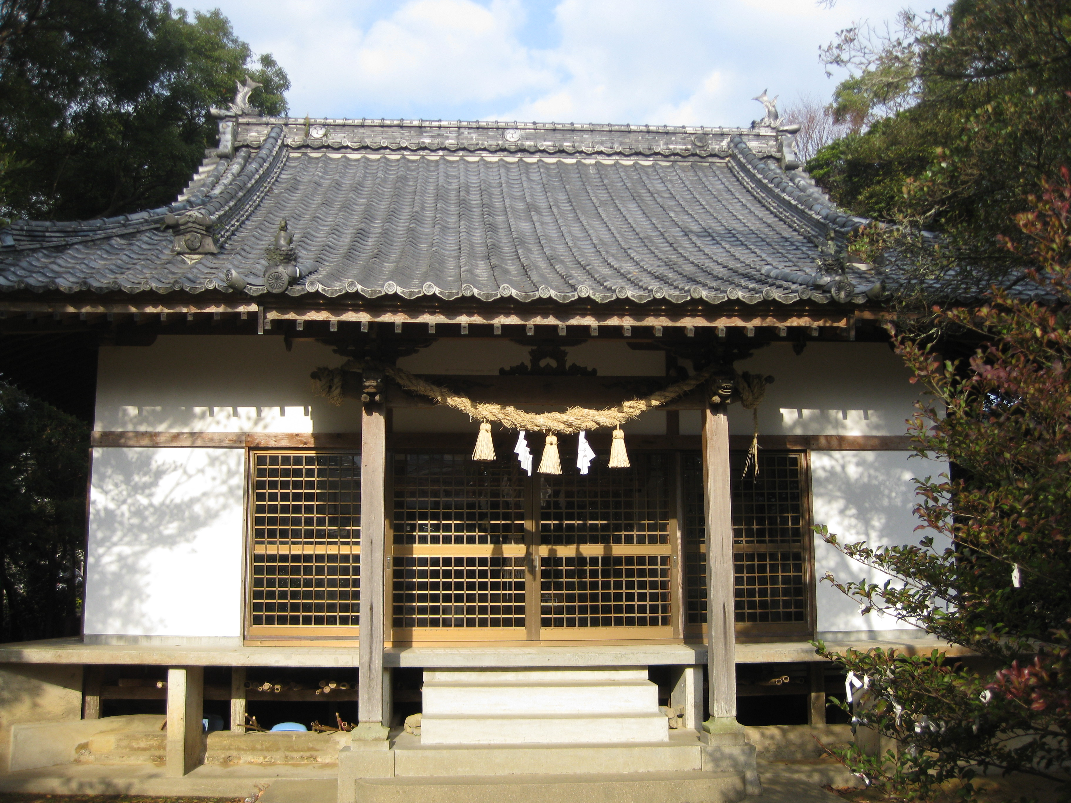 新魚目町 祖父君神社